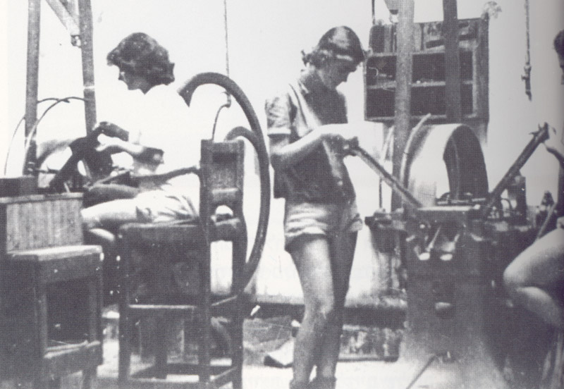 מכון אילון ייצור כדורים 1945-48 ארכיון ההגנה ג